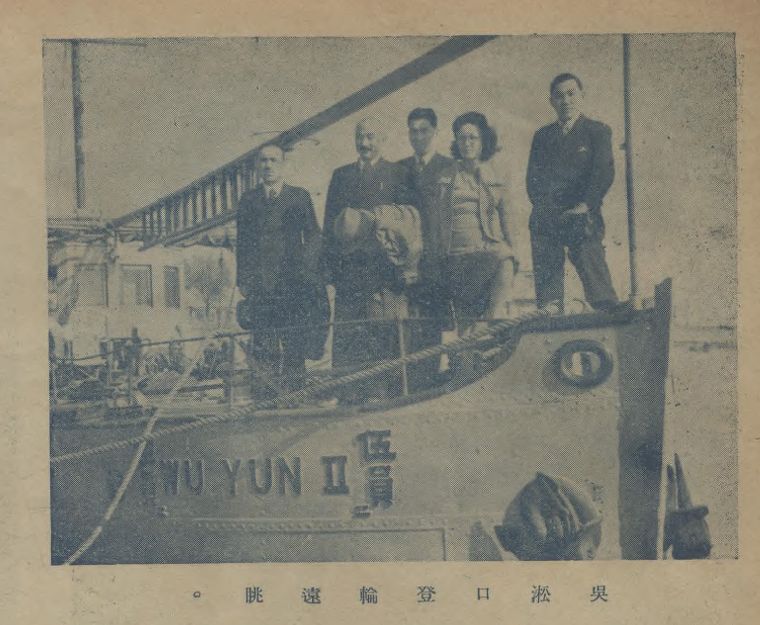 中文（中国大陆）: 新疆省國民大會代表於制憲國民大會在全國遊歷